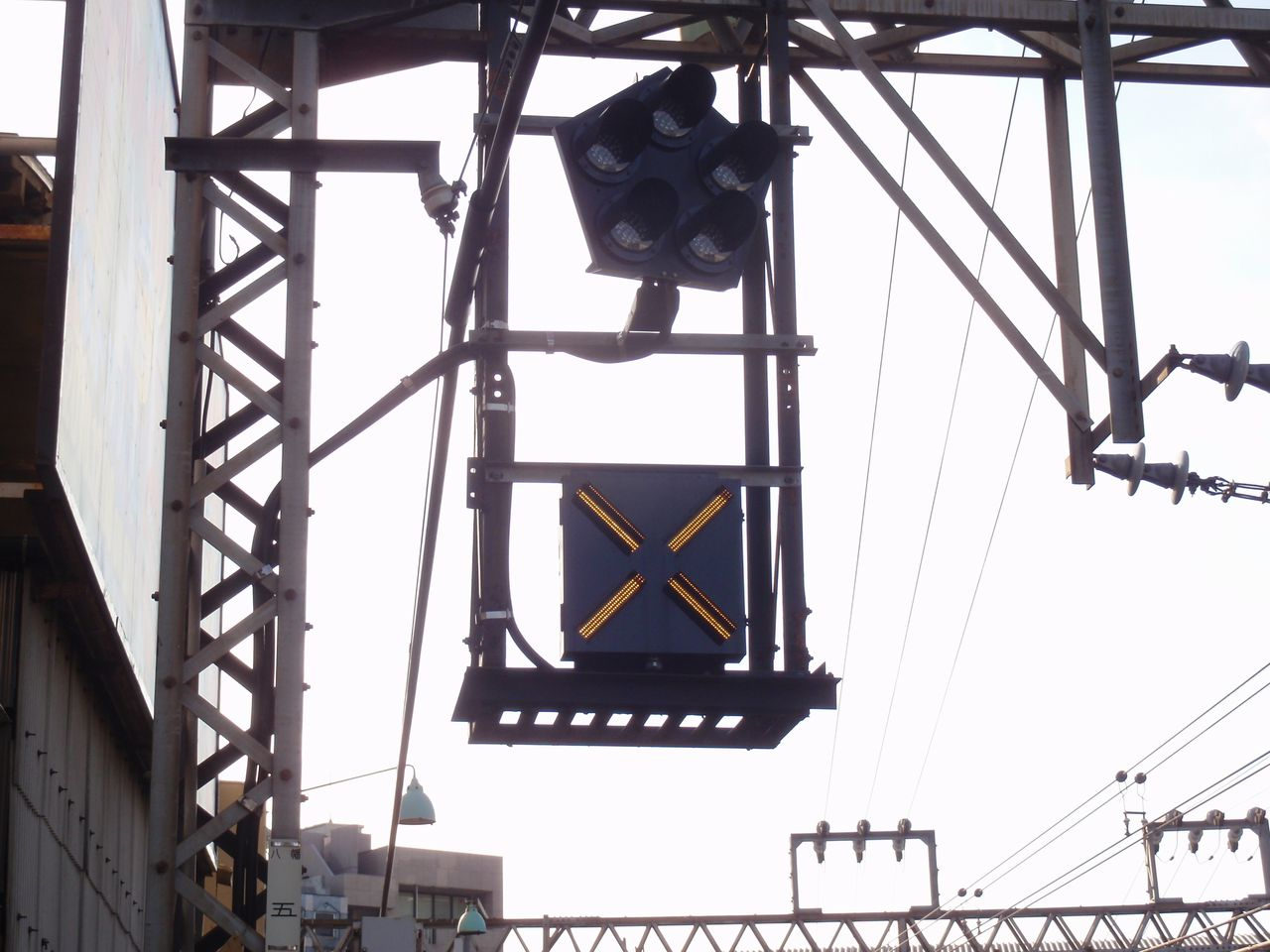 踏切動作反応灯(特殊信号発光機の下にある「×」サイン)